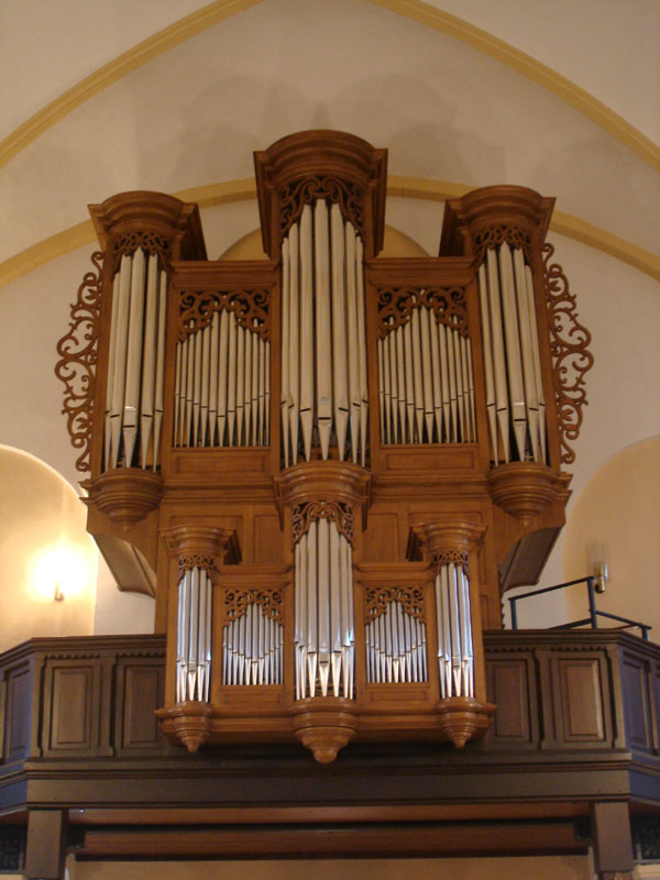 Di nei Koenig-Uergel vu Leideleng Foto: Sultan Edijingo